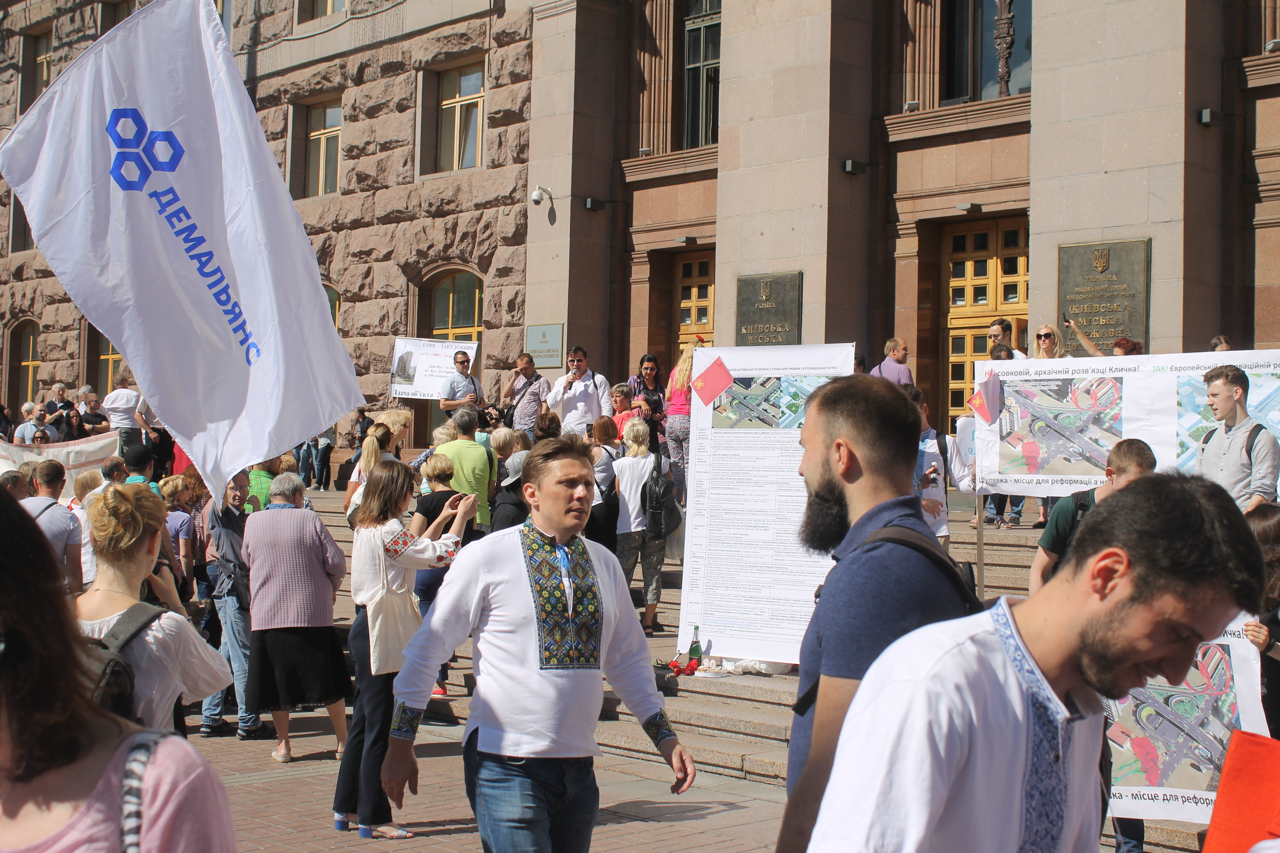 Мітинг на підтримку спорудження Шулявської розв’язки за проектом В. Петрука, 17.05.2018